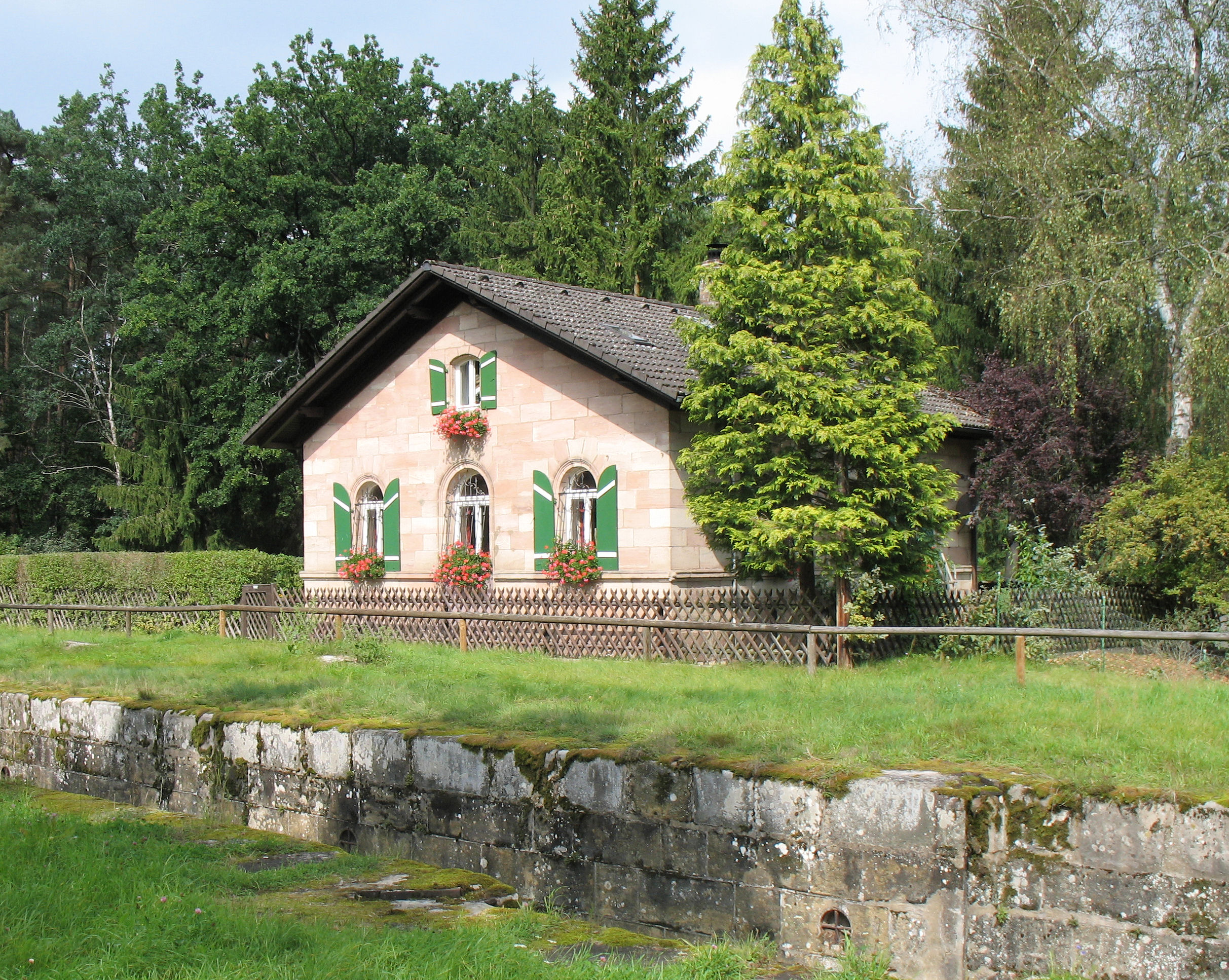 Schleusenwärterhaus am Ludwingskanal in der Nähe von Nürnberg